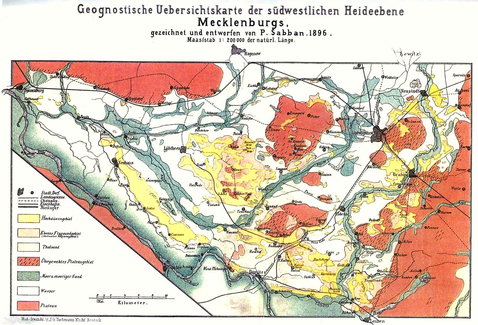 Geognostische Karte von SW-Mecklenburg (1896) von P. Sabban